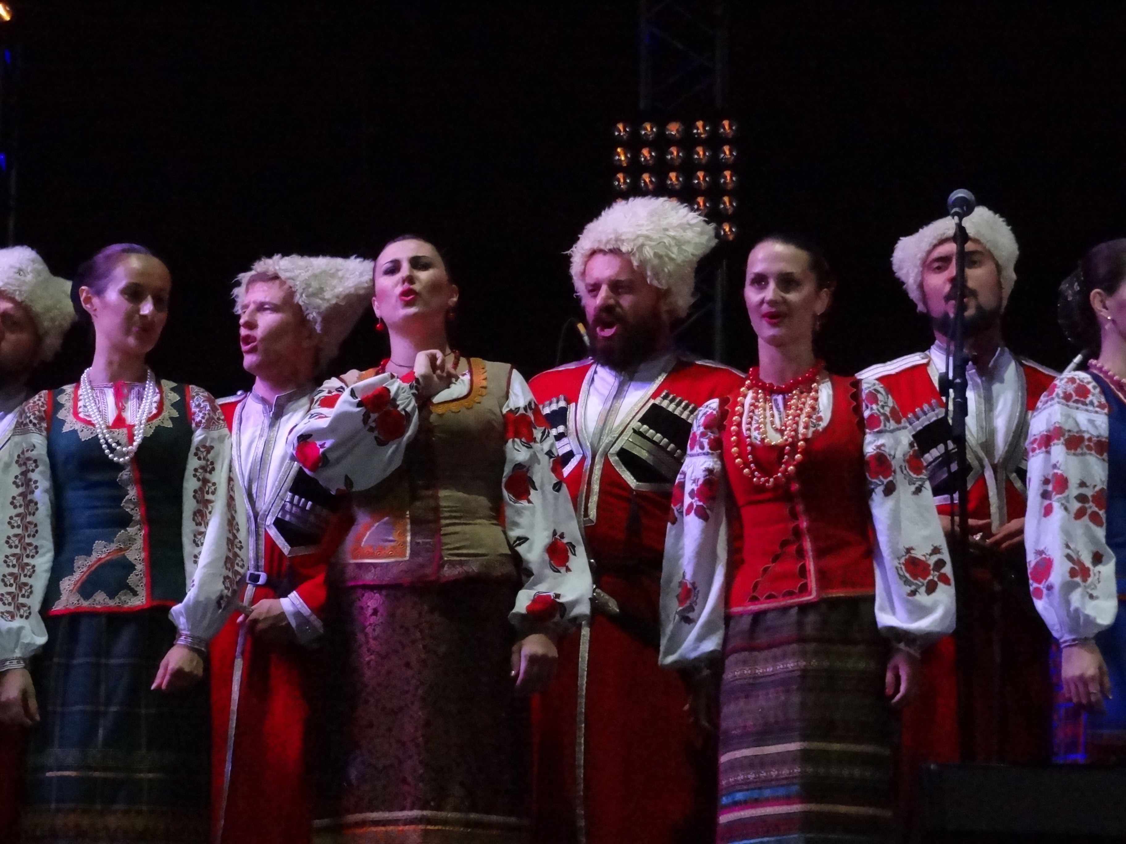 Концерт для участников X Международного инвестиционного форума состоялся в Сочи. 2011 год.